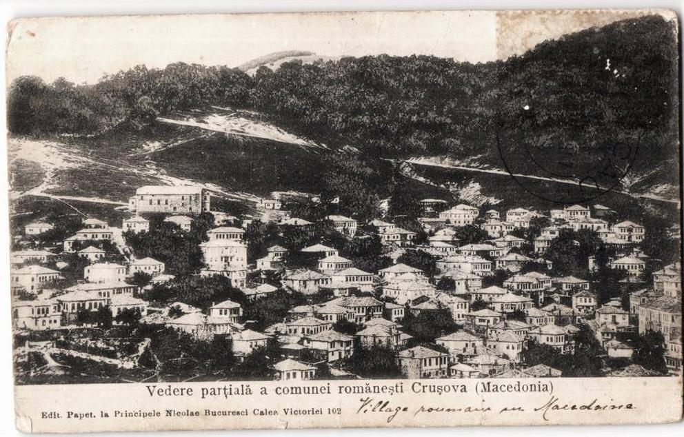 Крушево, румънска пощенска картичка